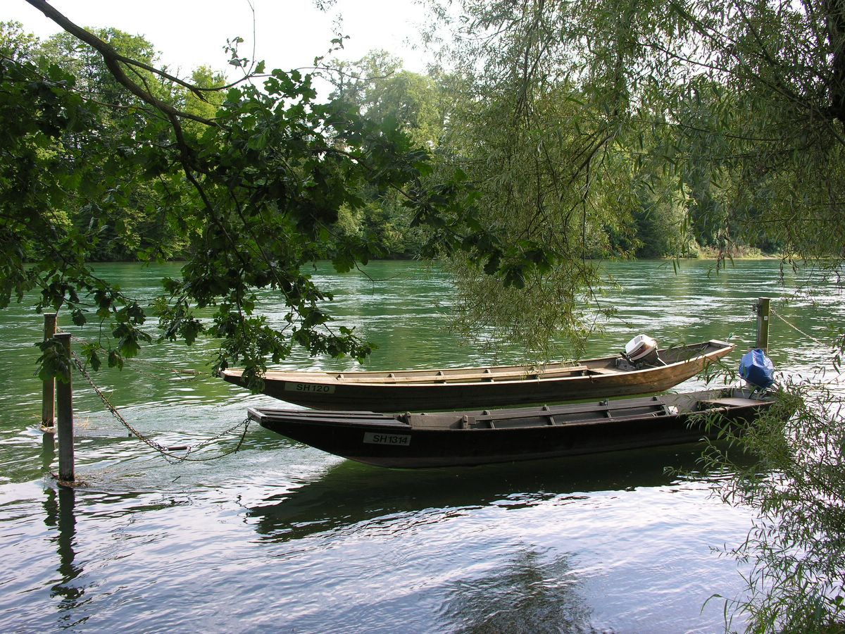 Dörflingen, Rhein bei der Loog